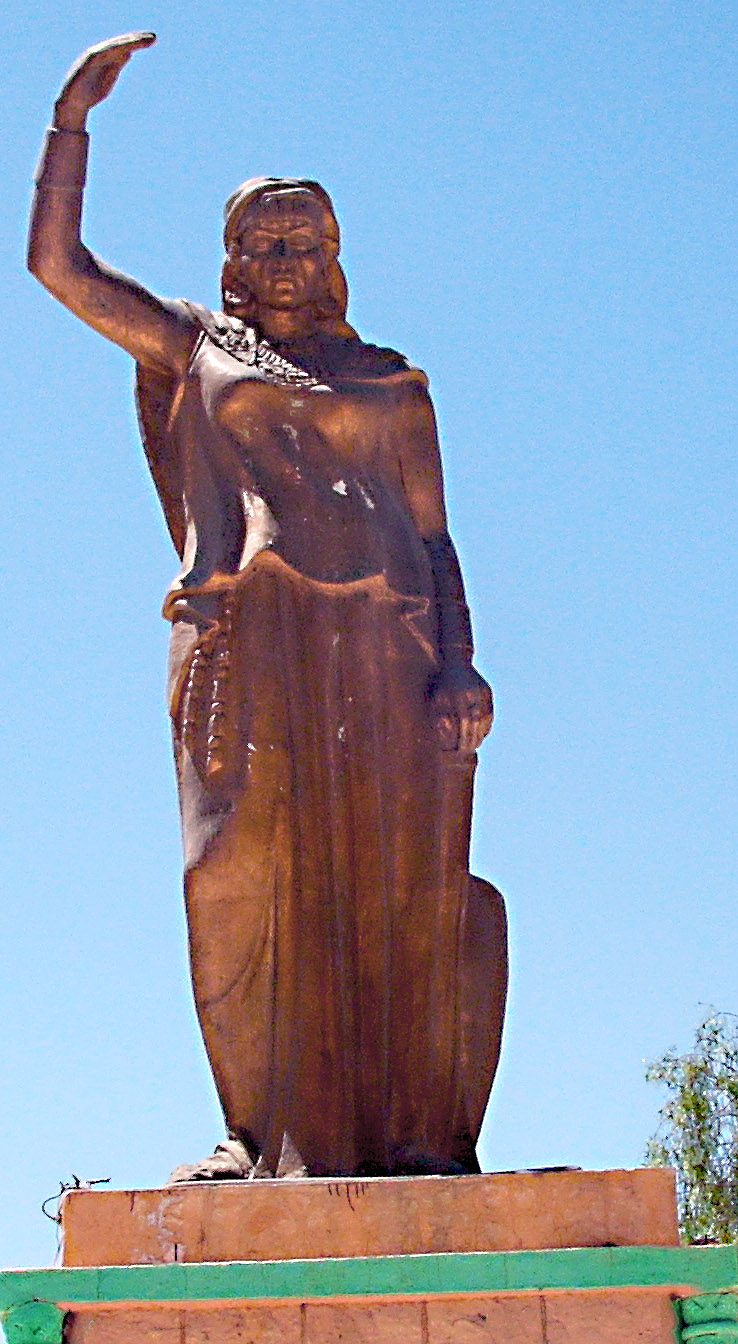 Photographie de la statue de "La Kahena" prise au centre-ville de Khenchela